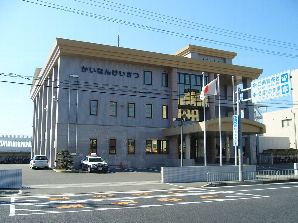 海南警察署